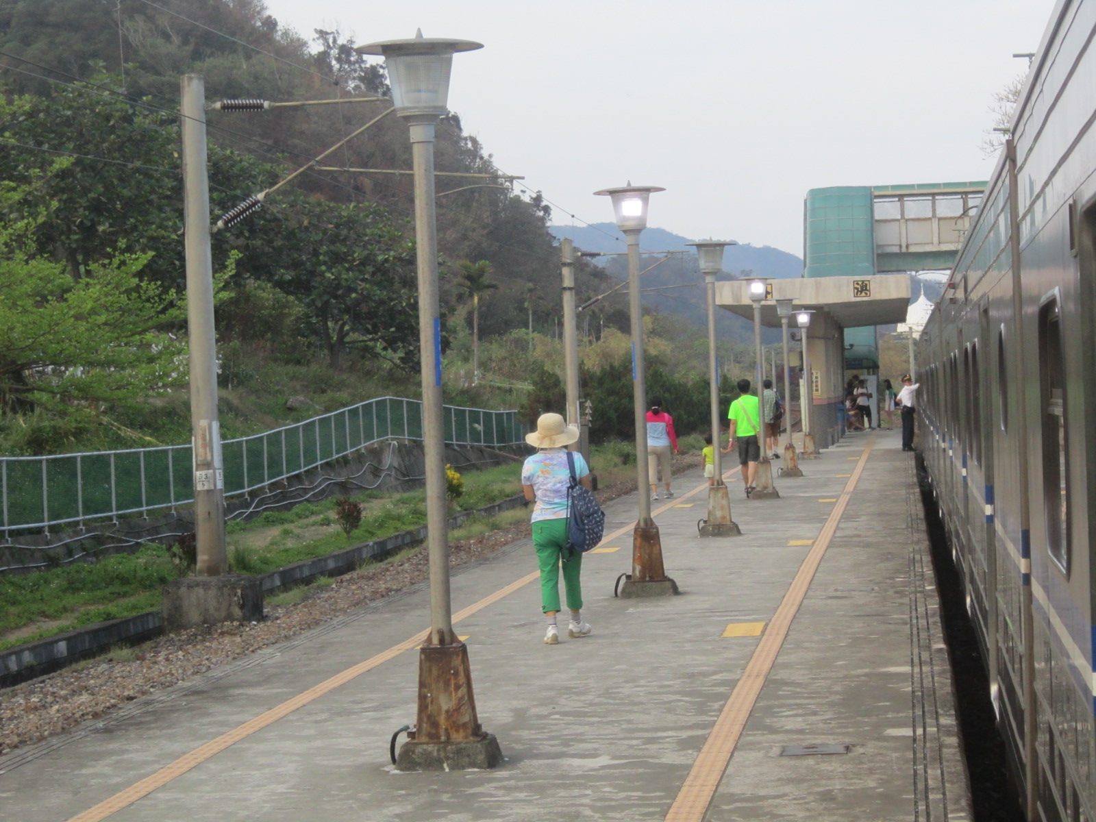 臺灣鐵路管理局EMU500型電聯車停靠外澳車站。